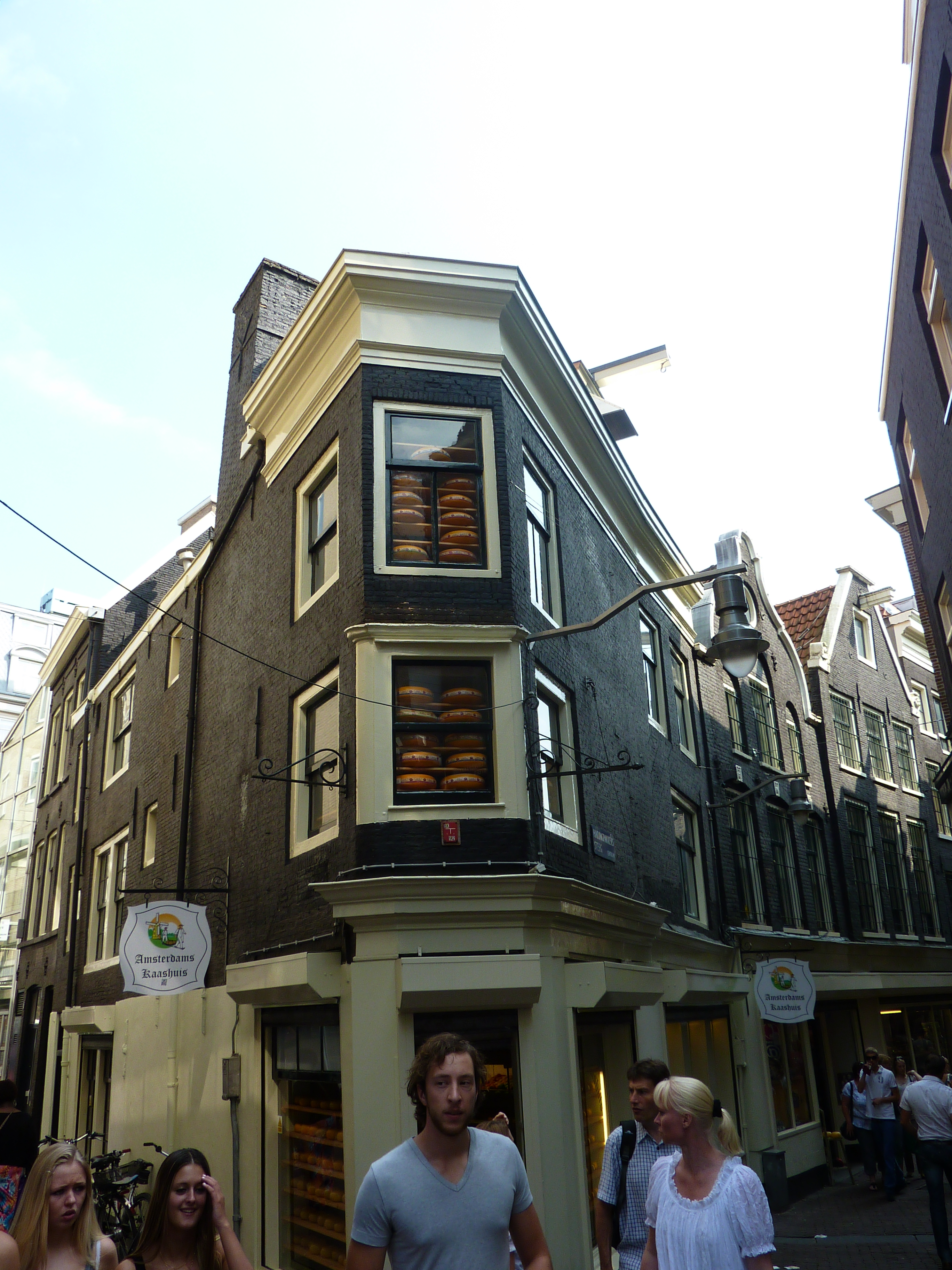 Amsterdam, Haringpakkersteeg 2